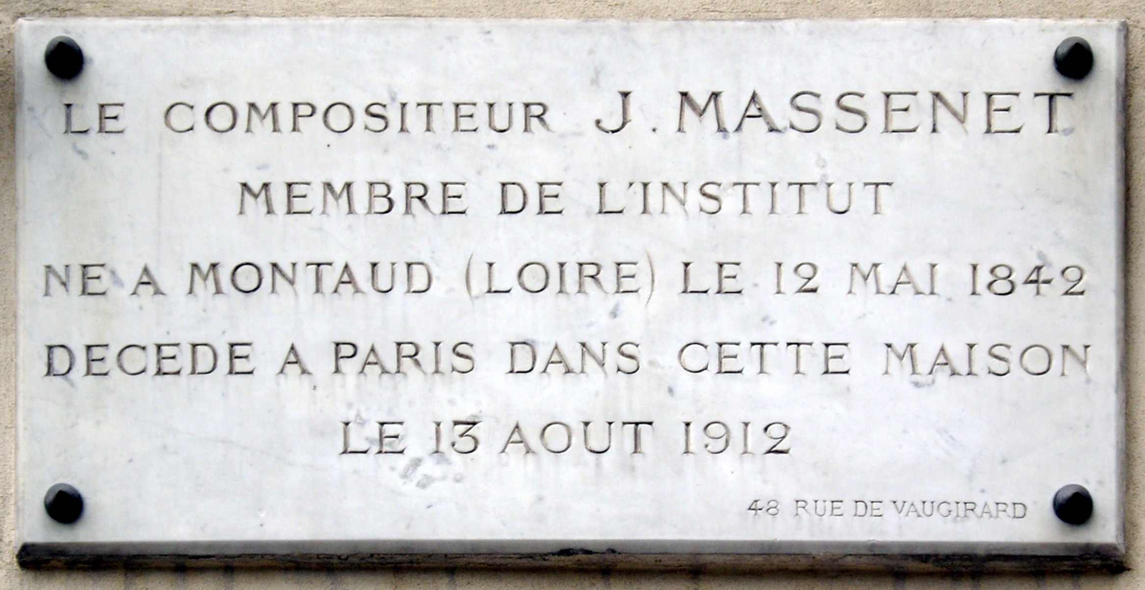 Plaque apposée au n° 48 de la rue Vaugirard, Paris 6e, où mourut le compositeur Jules Massenet (1842-1912) le 13 août 1912.